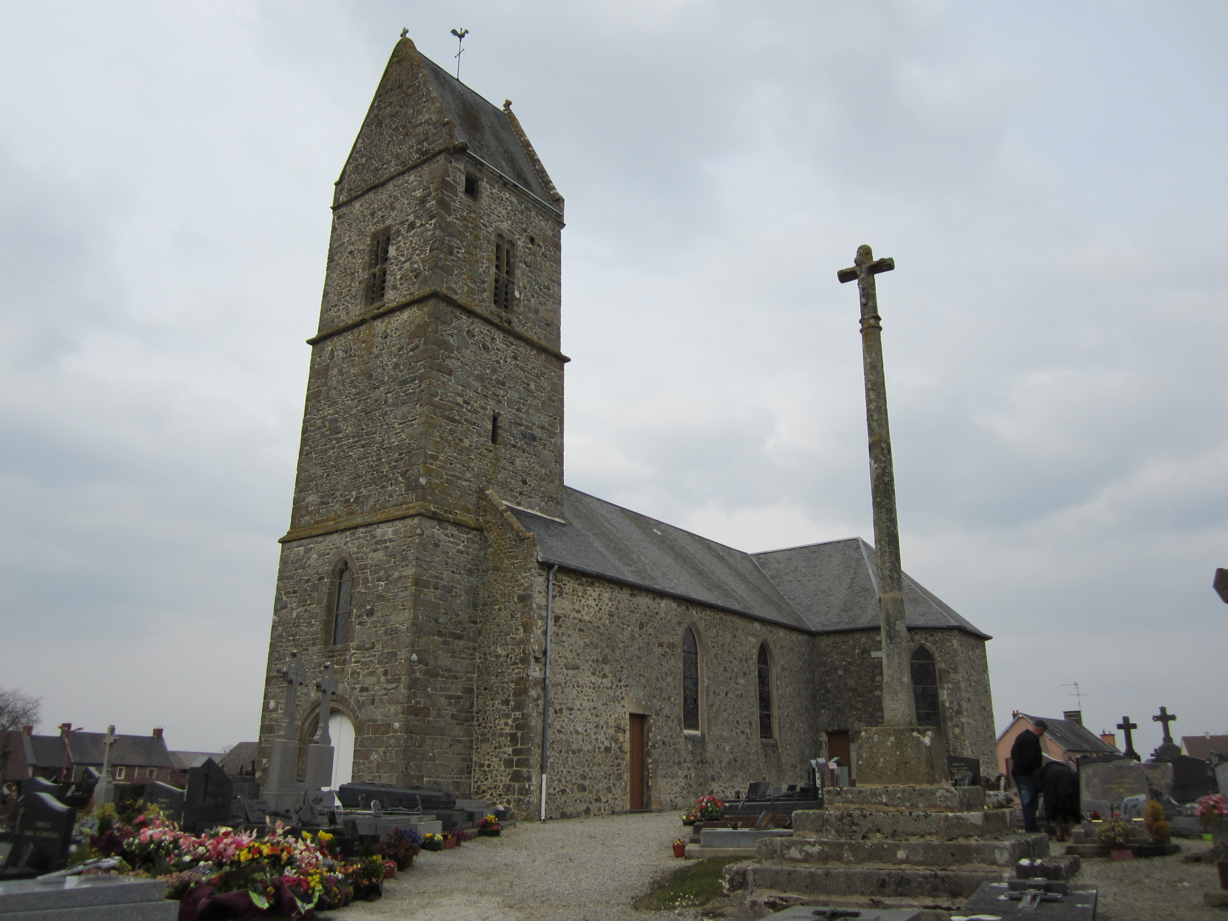 Église Notre-Dame de La Ronde-Haye